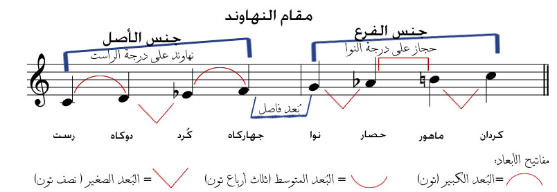 مقام نهاوند Nahawand Maqam